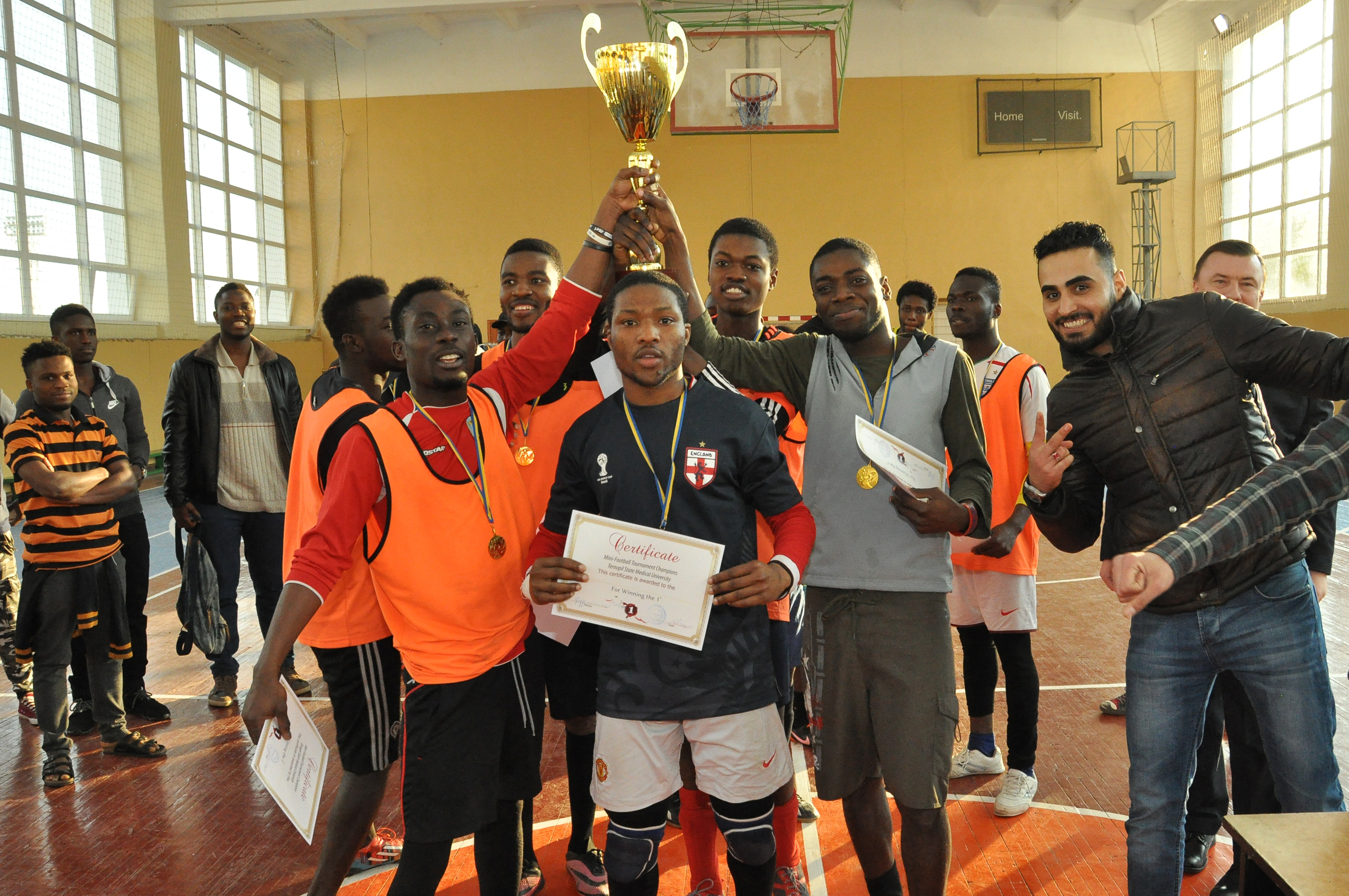 Міні-футбол «Ліга чемпіонів» Тернопільського державного медичного університету імені І. Я. Горбачевського. Півфінальні та фінальний поєдинки 26 квітня 2016 року. І місце — команда з Гани.